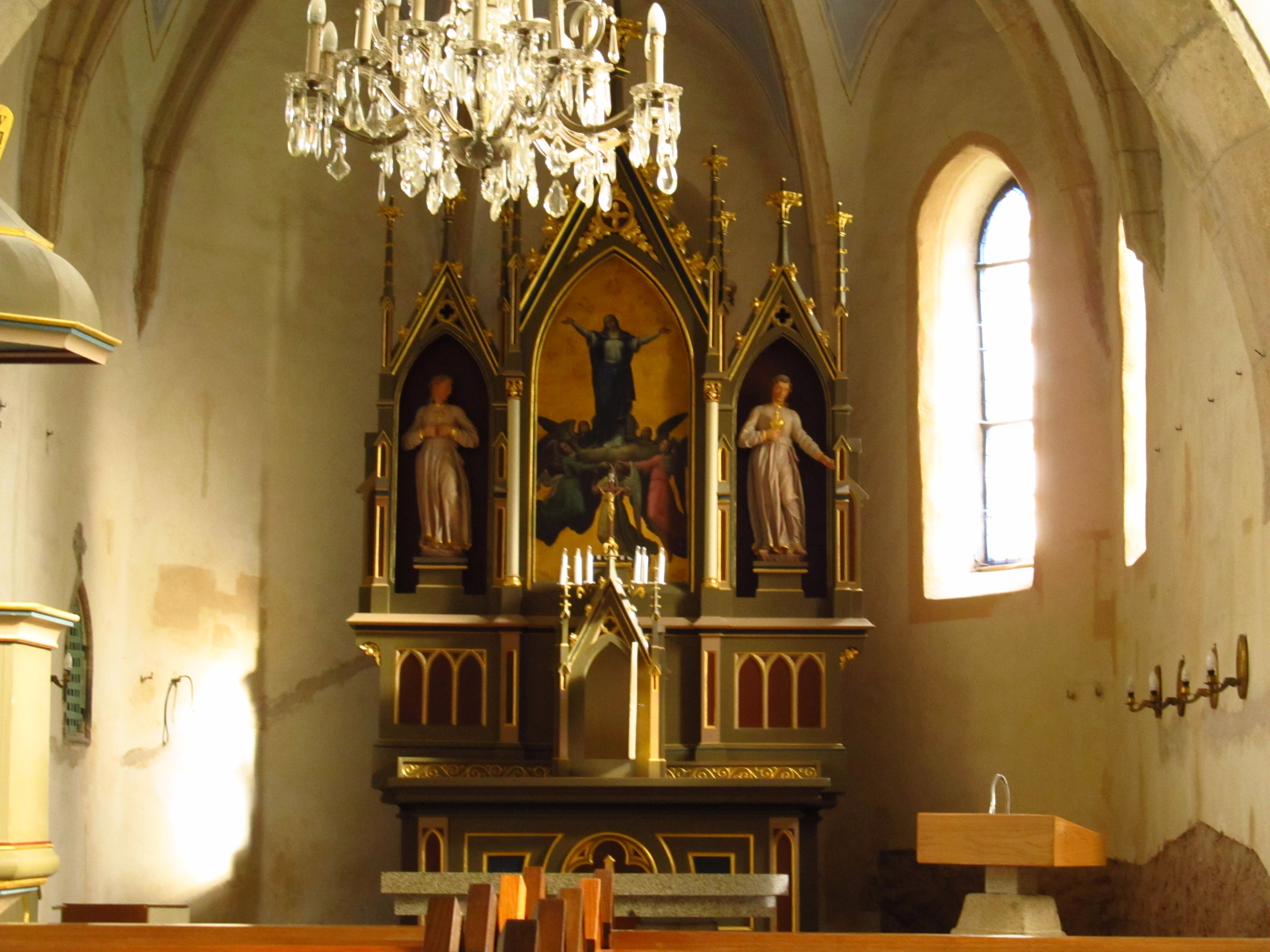 Kostel Nanebevzetí Panny Marie, jižní konec návsi, Číhošť.